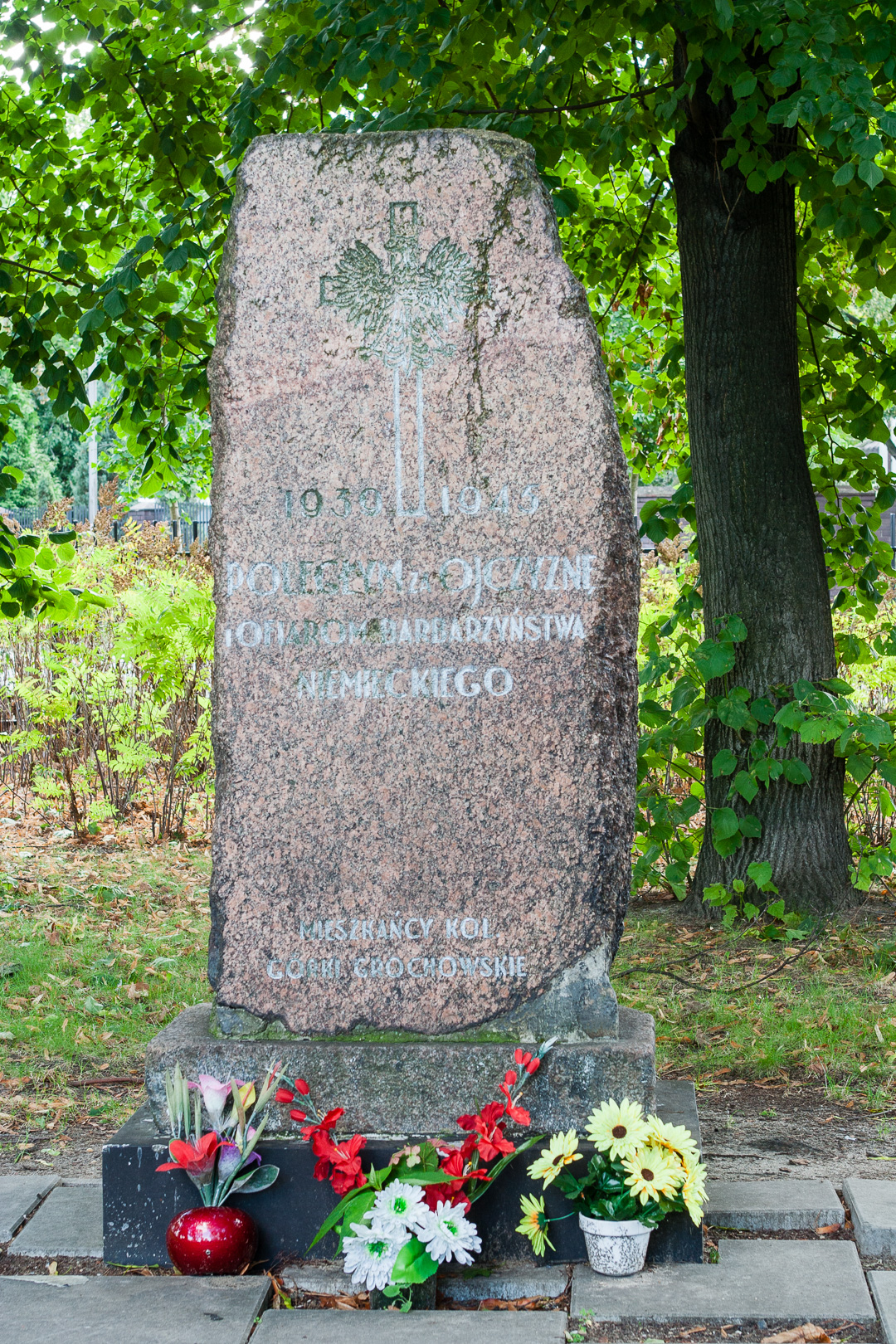 Pomnik stojący w Parku Znicza na Grochowie w Warszawie z napisem: 1939 1945 POLEGŁYM ZA OJCZYZNĘ OFIAROM BARBARZYŃSTWA NIEMIECKIEGO MIESZKAŃCY KOL GÓRKI GROCHOWSKIE